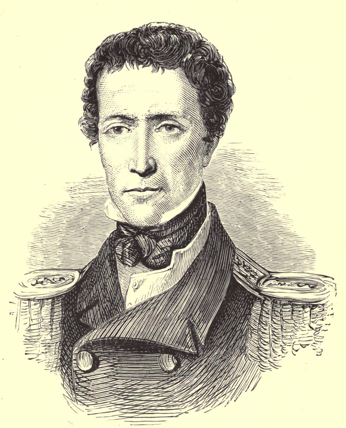 Allen Francis Gardiner (n. Basildon, Inglaterra, 28 de enero de 1794 – Tierra del Fuego, Argentina, 6 de septiembre de 1851) fue un misionero anglicano británico que tuvo una importante actuación entre los yámana, indígenas del extremo austral de América del Sur.